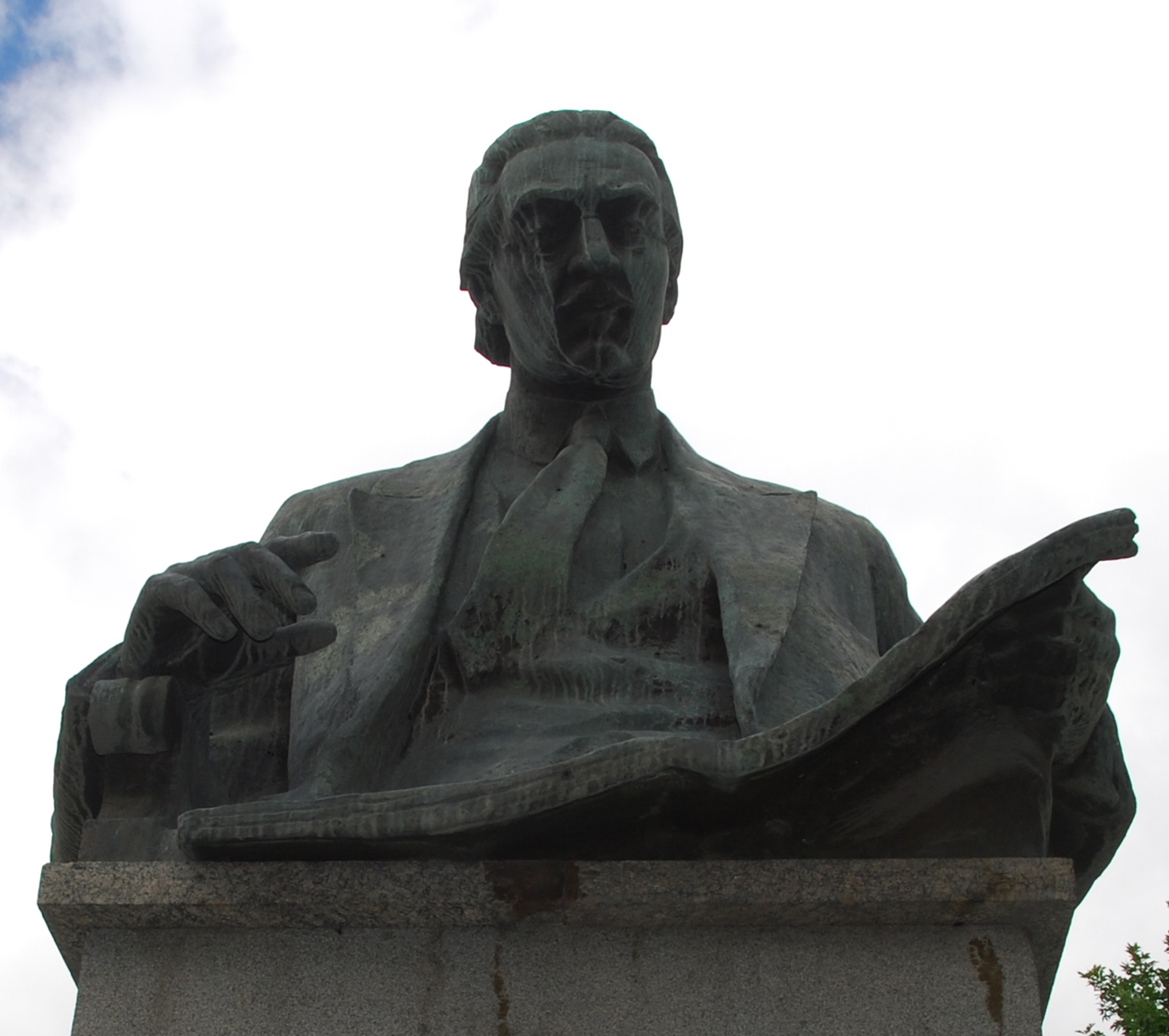 Памятник Армену Тиграняну в Гюмри